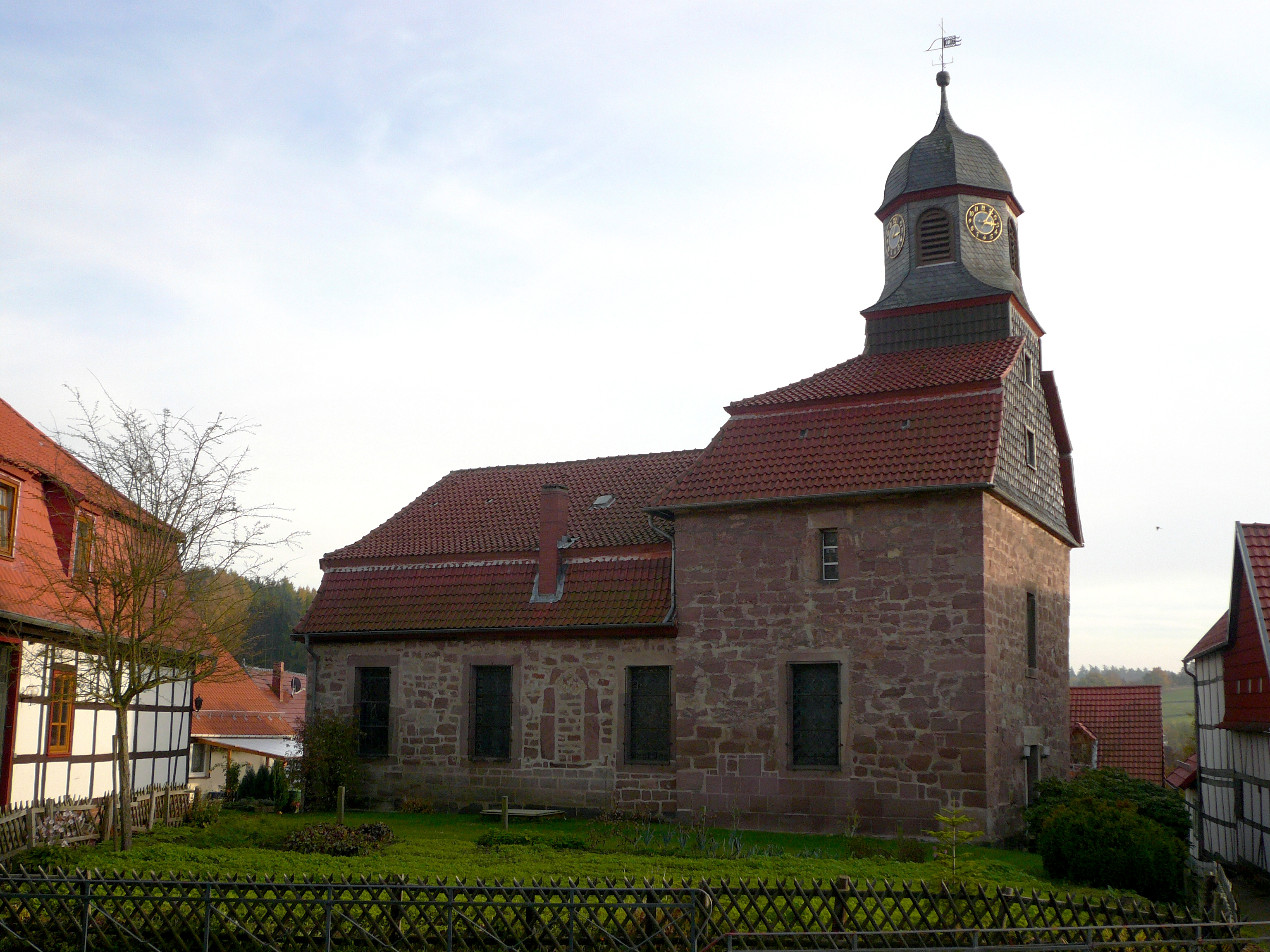 Ev.-luth. Kirche St. Matthias in Bremke, Gemeinde Gleichen, Landkreis Göttingen. Im Kern mittelalterlich, Umbauten 1772.